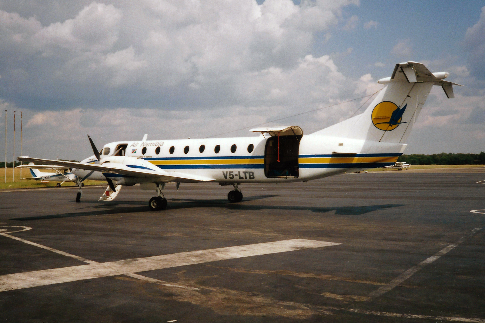 Victoria Falls (VFA / FVFA) Zimbabwe 4.1998